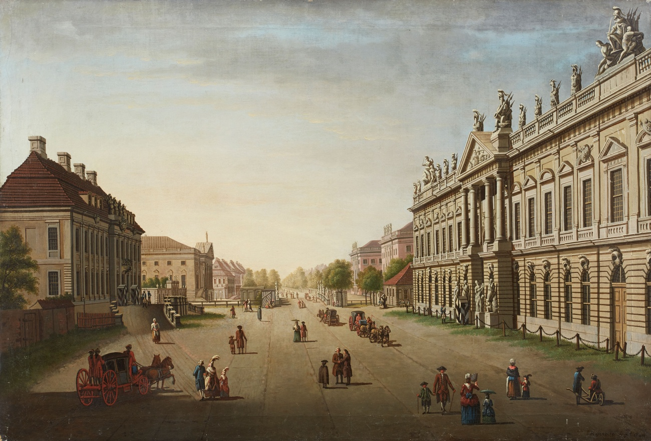 Zwischen Schloss und Unter den Linden mit Zeughaus, Kronprinzenpalais und Oper. Öl auf Leinwand. 57 x 84 cm. Signiert und datiert unten rechts: J. Rosenberg pinxit 1784